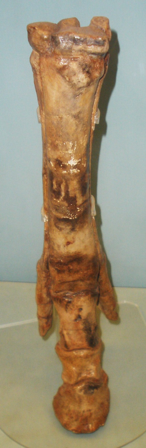 Fossil of Cremohipparion, an extinct mammal - Took the picture at Museo di Paleontologia di Firenze